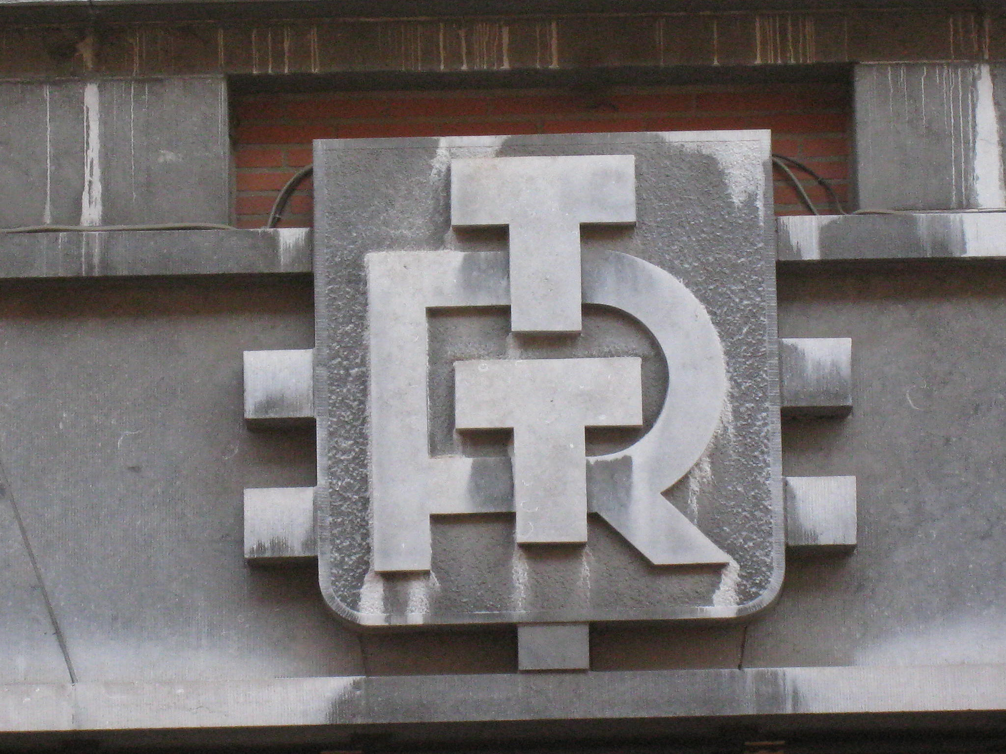 Logo RTT